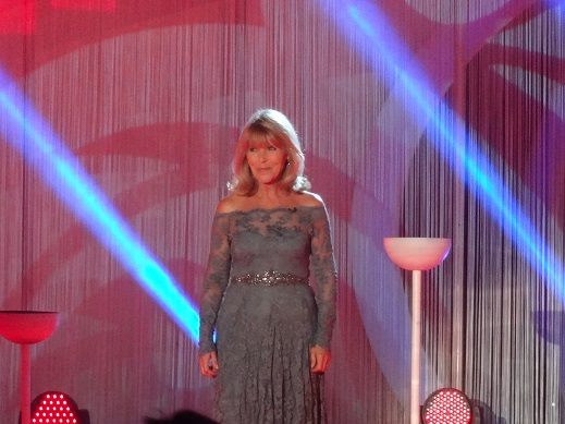 Lena Valaitis bei der Generalprobe zu "Das Herbstfest der Träume"